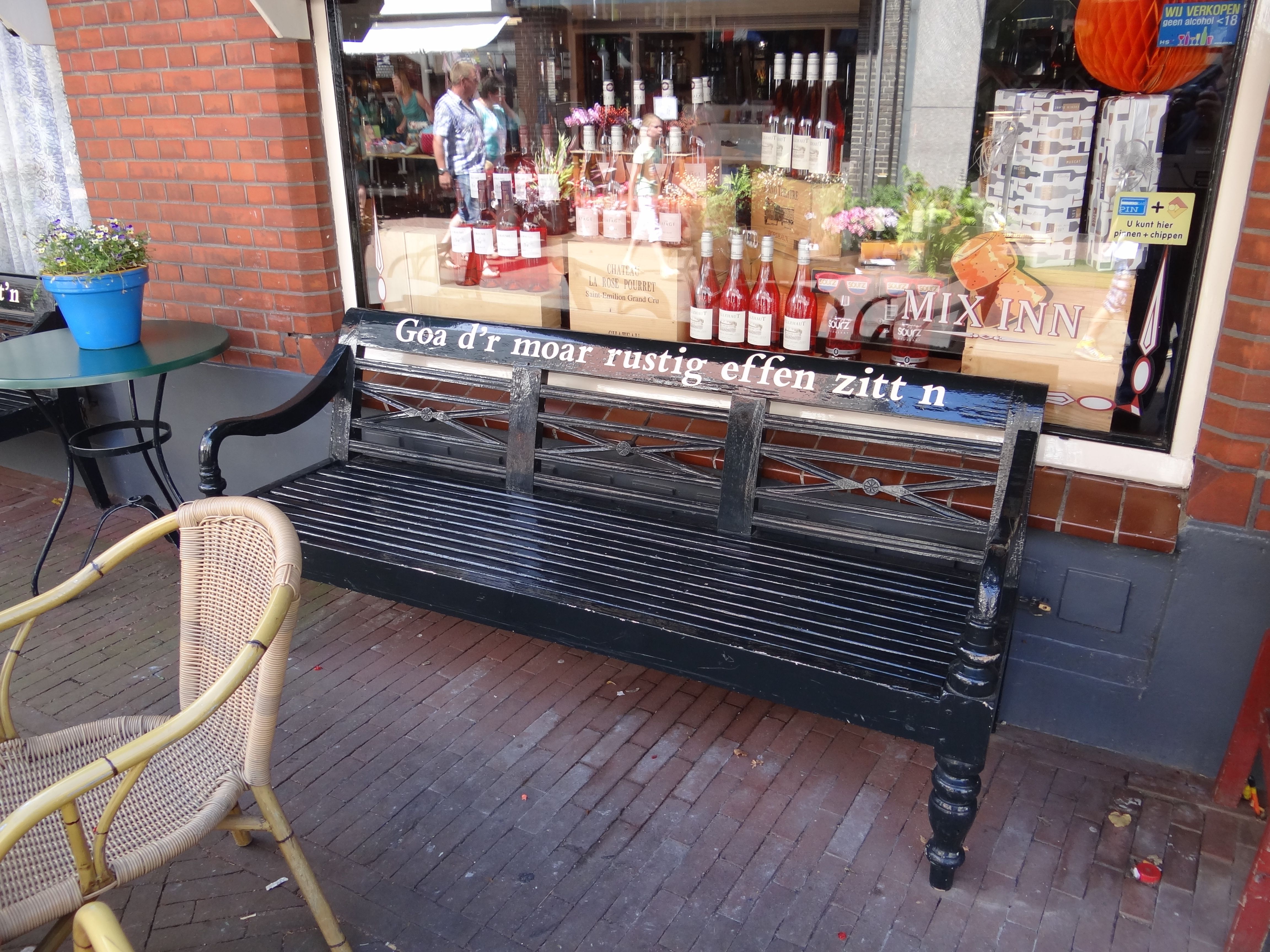 Nedersaksies: Lechtenvoorde_zitt-n.jpg